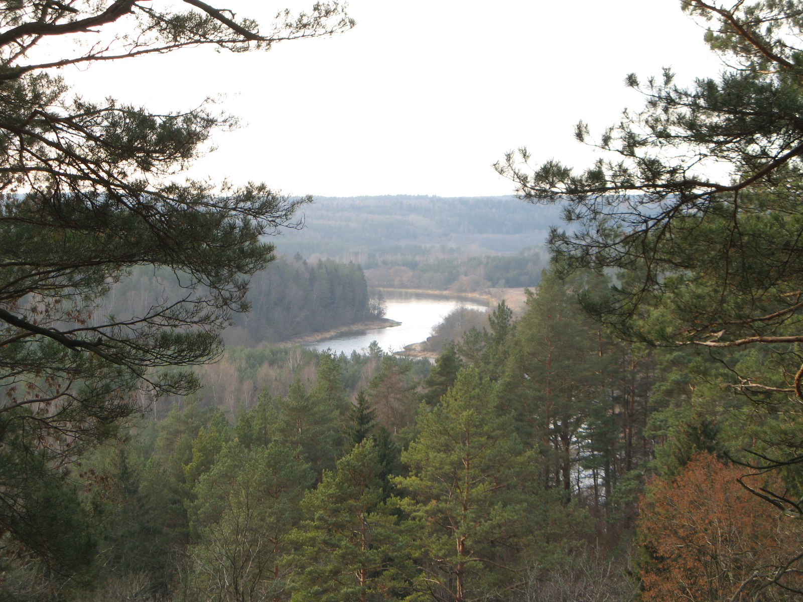 Vaizdas nuo Naujosios Rėvos piliakalnio